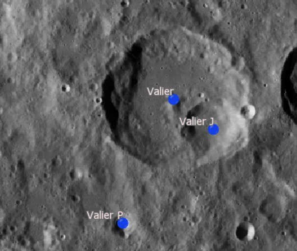 Cráter lunar Valier. Cráteres satélite. (Imagen LRO)